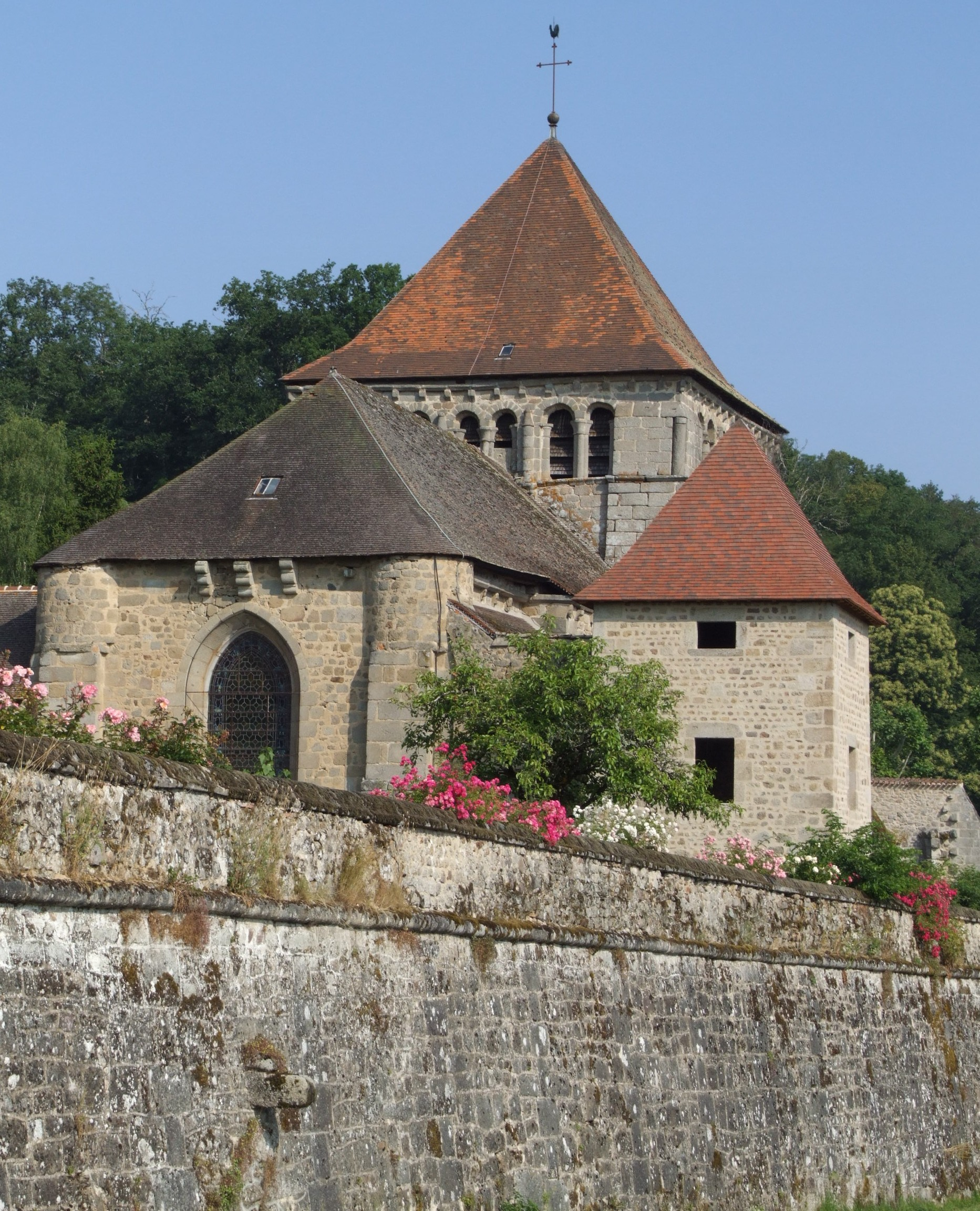 Abbaye de Moutier-d'Ahun - Chevet